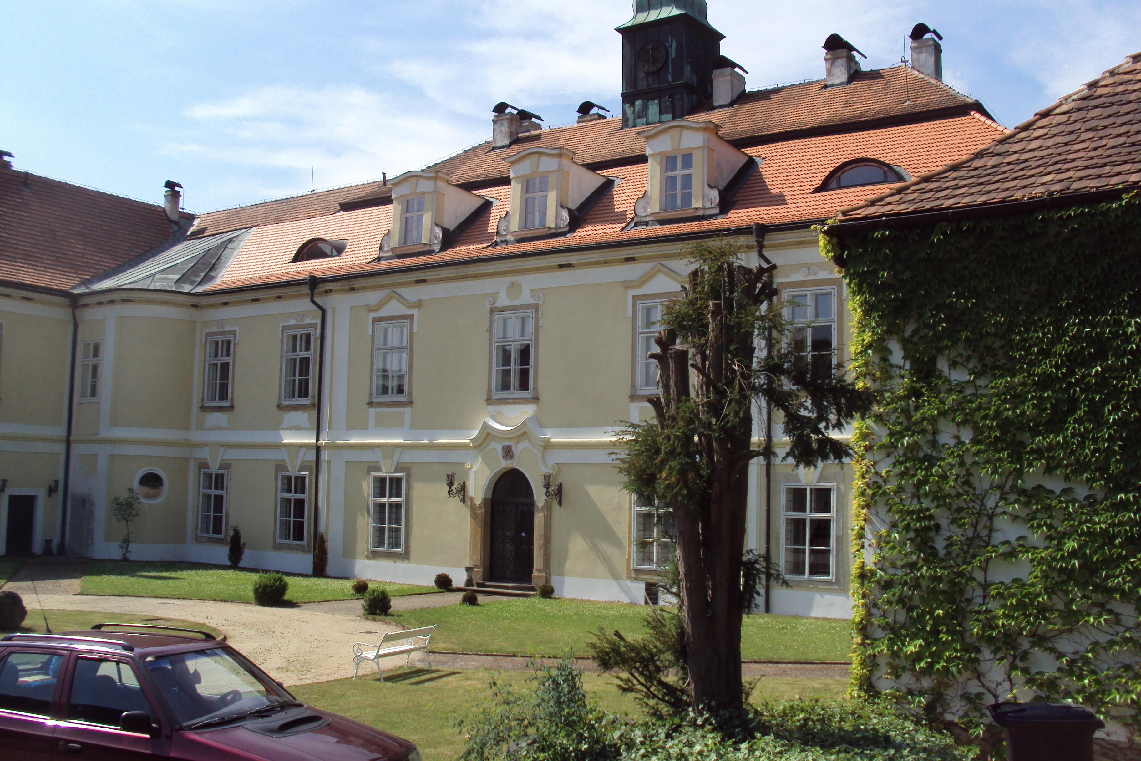 Zámek je ve stejnojmenné osadě města Dubá